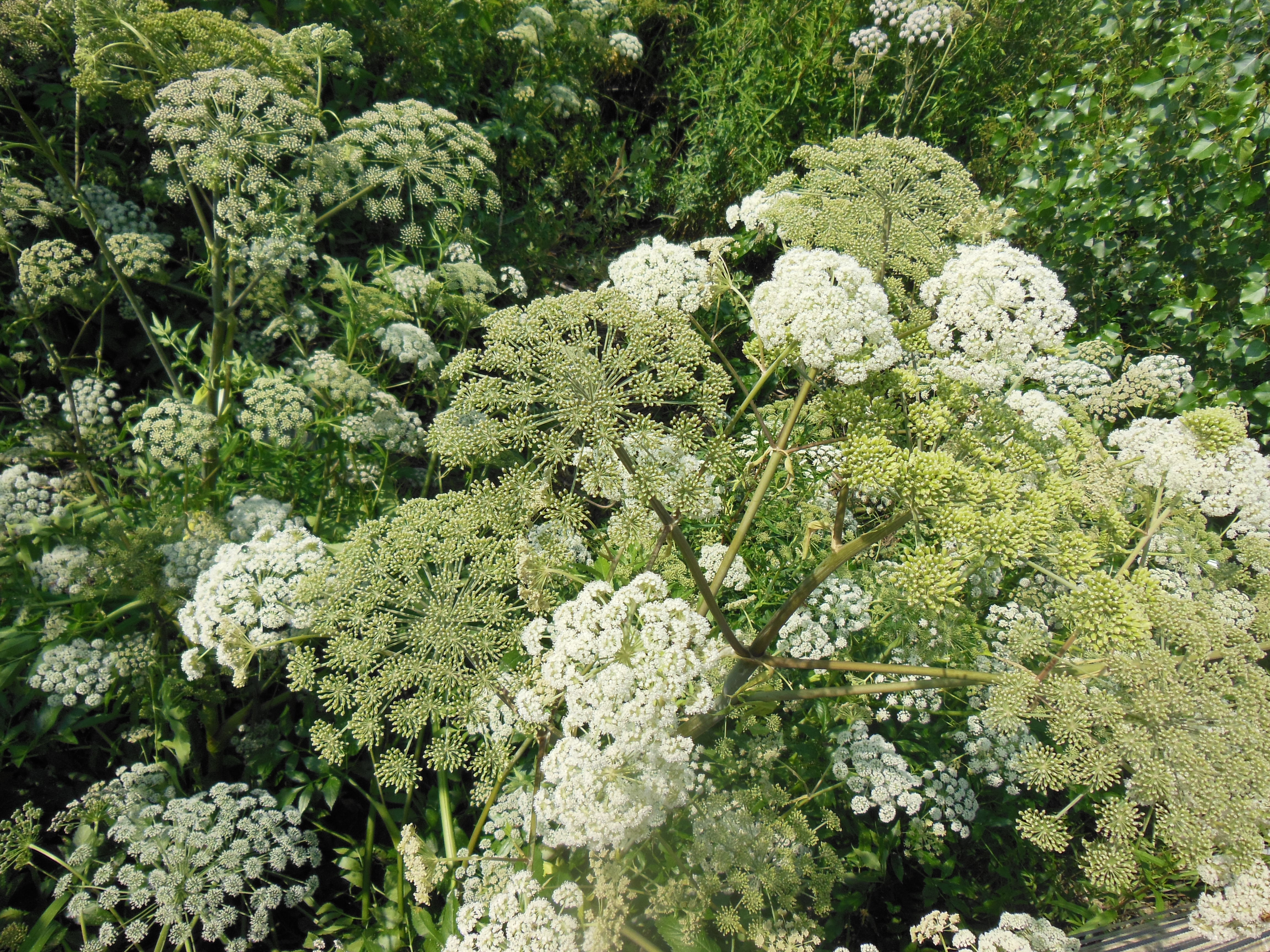 Angelica heterocarpa, ou Angélique des estuaires, en bordure de Loire à Nantes (France)